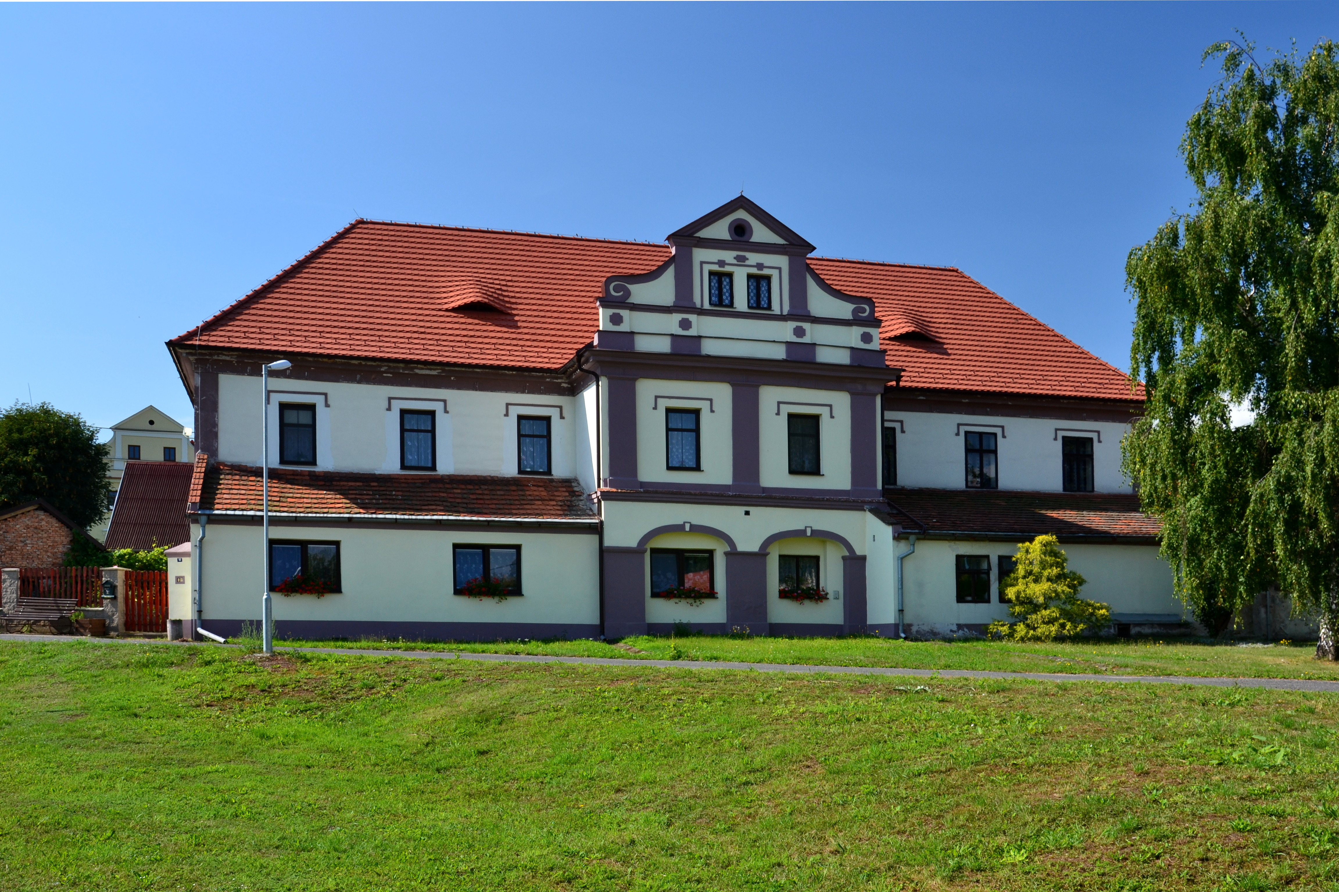 Venkovská usedlost s kovárnou (Libědice), Libědice 10